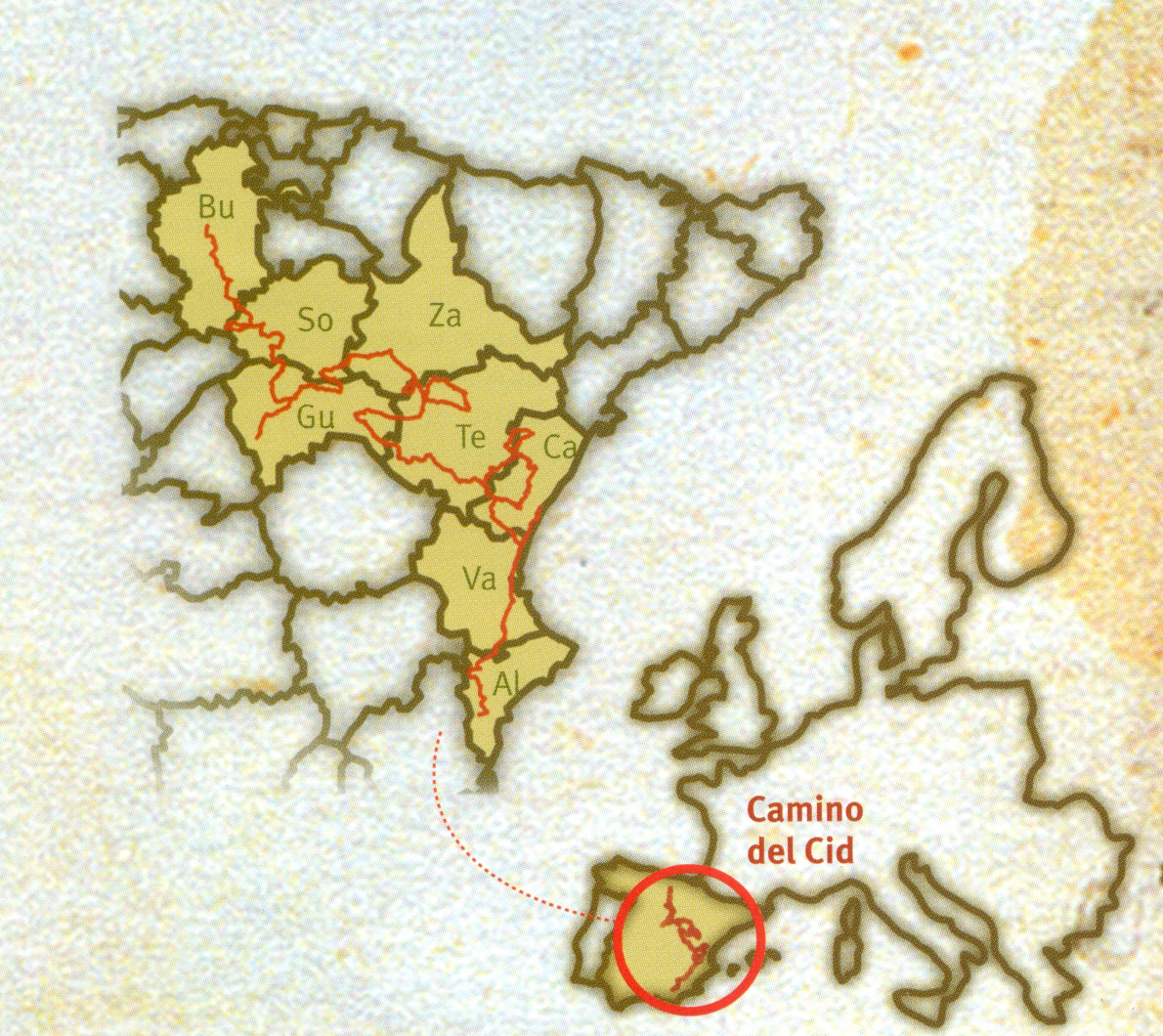 El Camino del Cid recorre ocho provincias españolas: Burgos, Soria, Guadalajara, Zaragoza, Teruel, Castellón, Valencia y Alicante